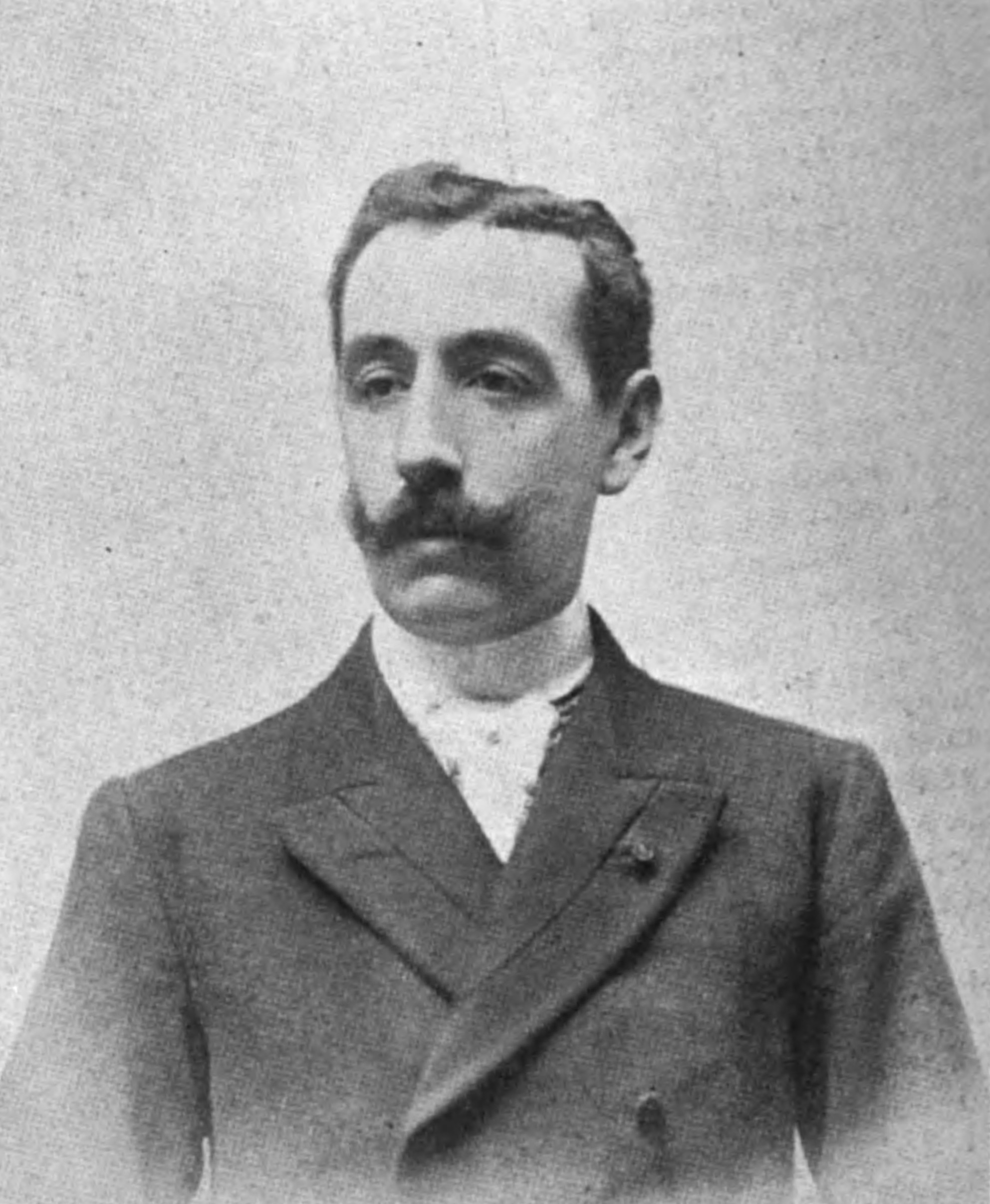 Marqués de Portago. Director General de Correos y Telégrafos (de fotografía de Franzen)